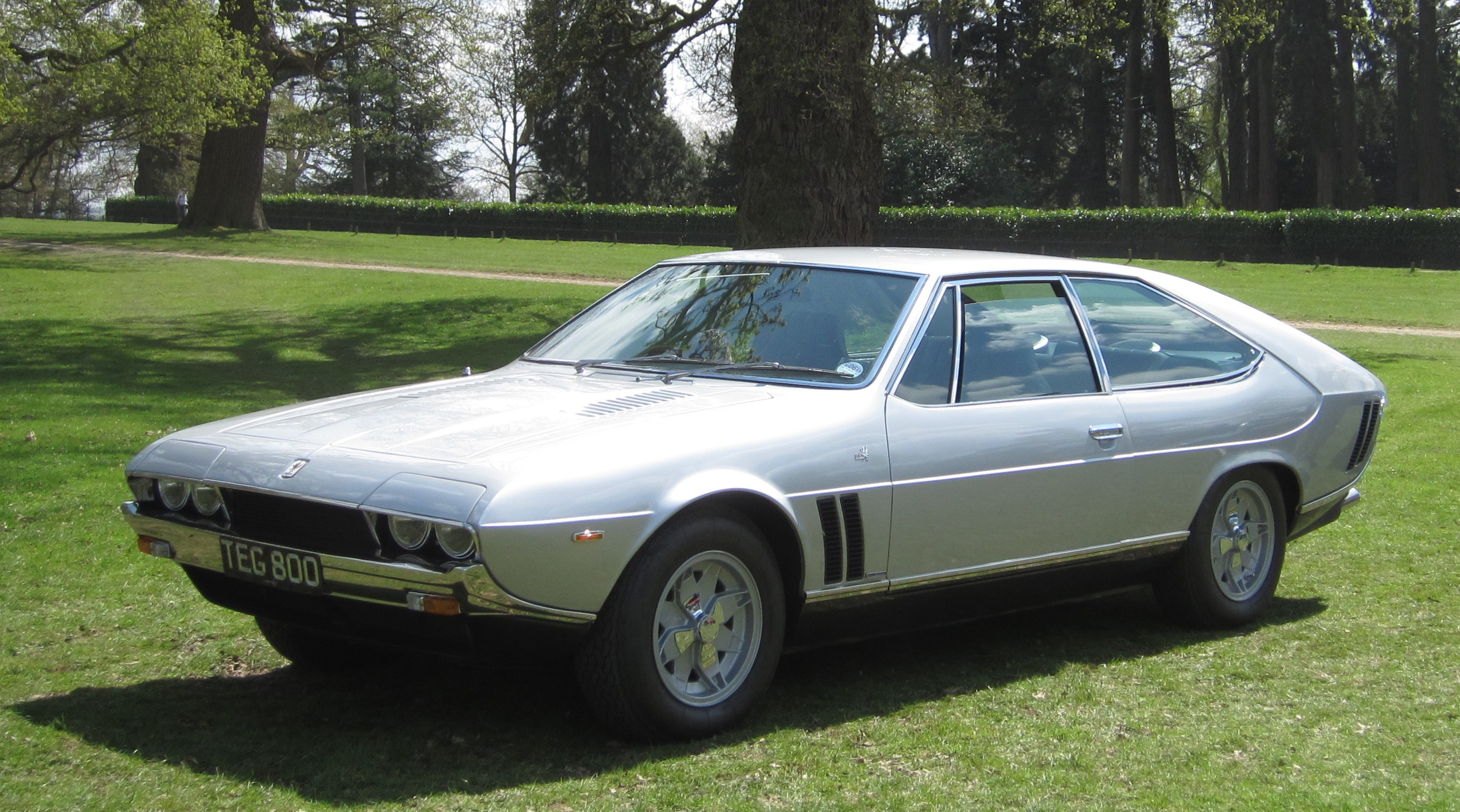 Iso Lele (vers 1973) en angleterre